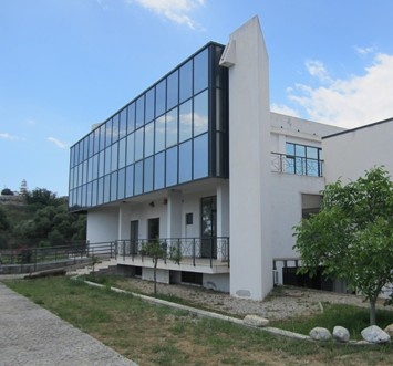 Esterno del Museo Archeologico di Monasterace